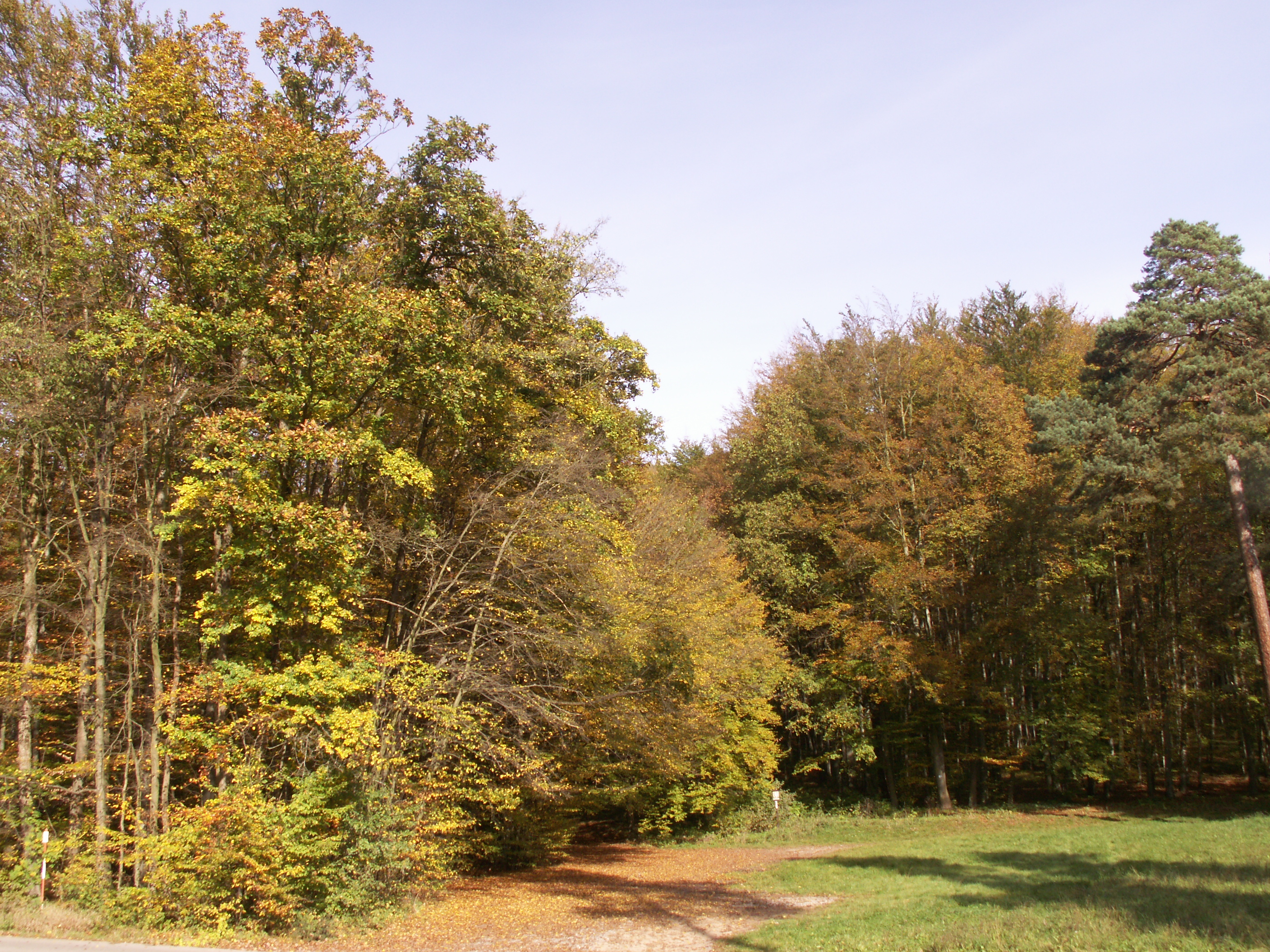 Přírodní rezervace Čihadlo, k.ú. Babice nad Svitavou, okres Brno-venkov